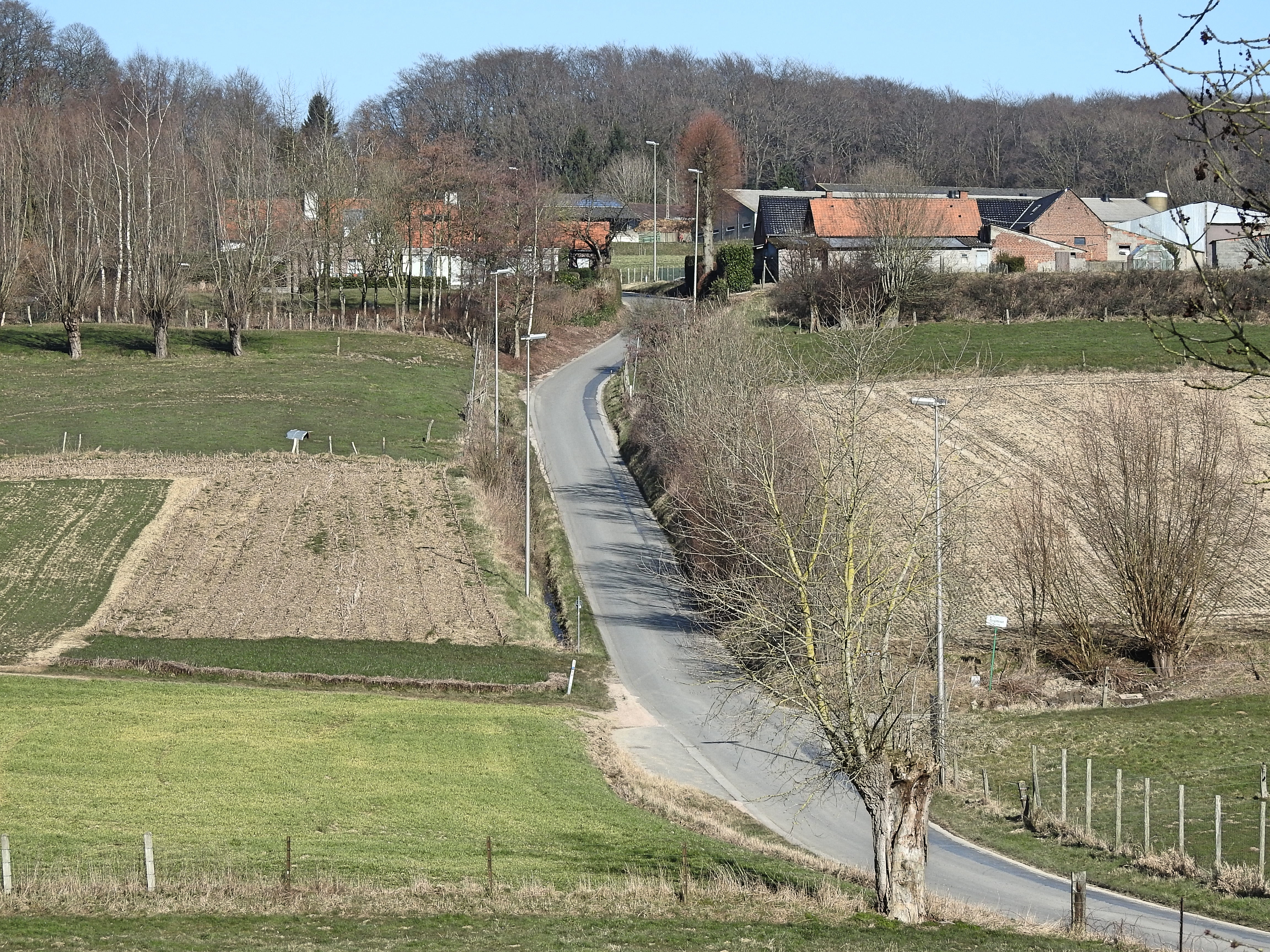 Kanarieberg gezien vanuit het zuiden (N48)